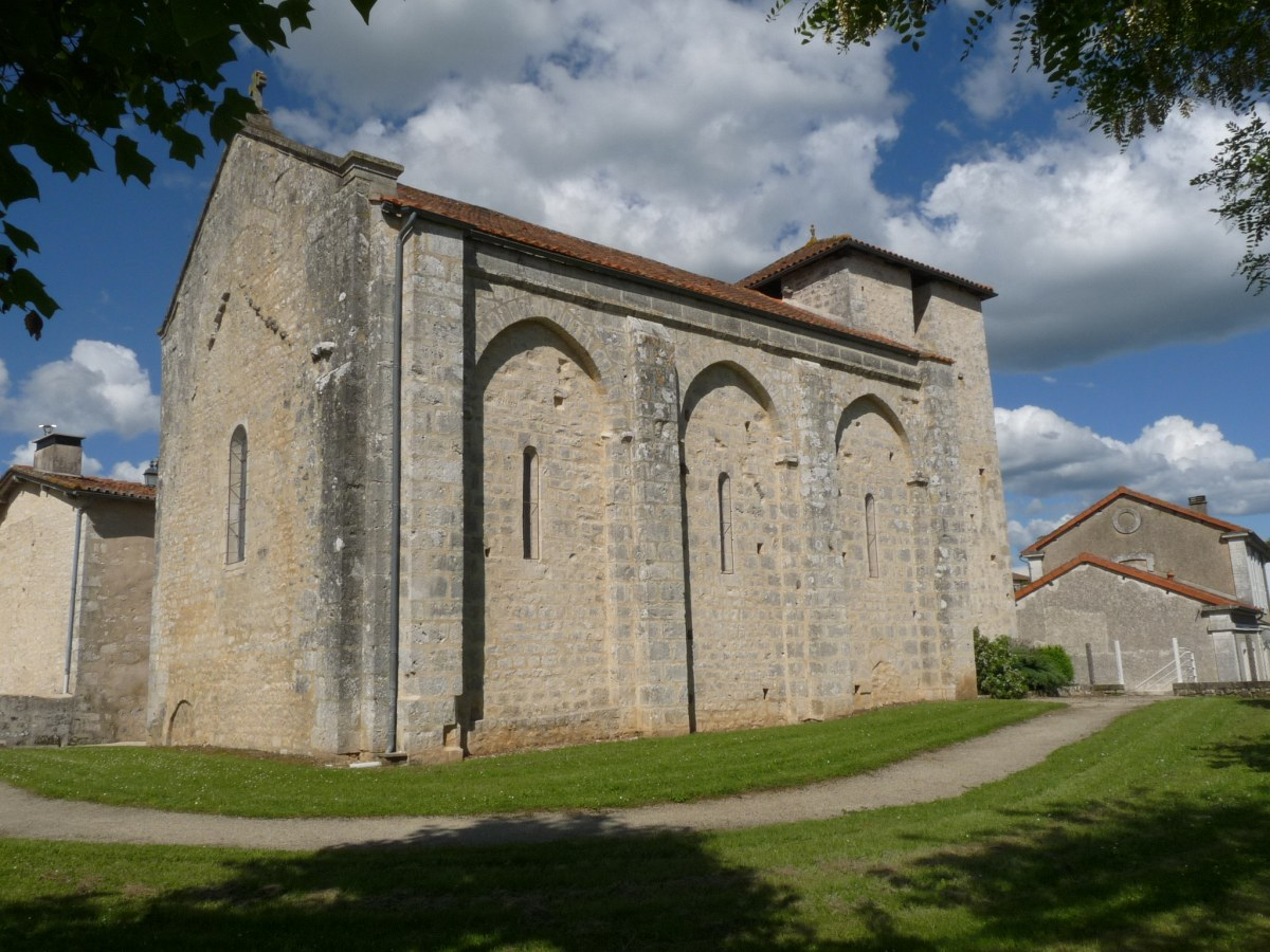 Eglise de Vilhonneur (vue du sud-ouest), Charente, France